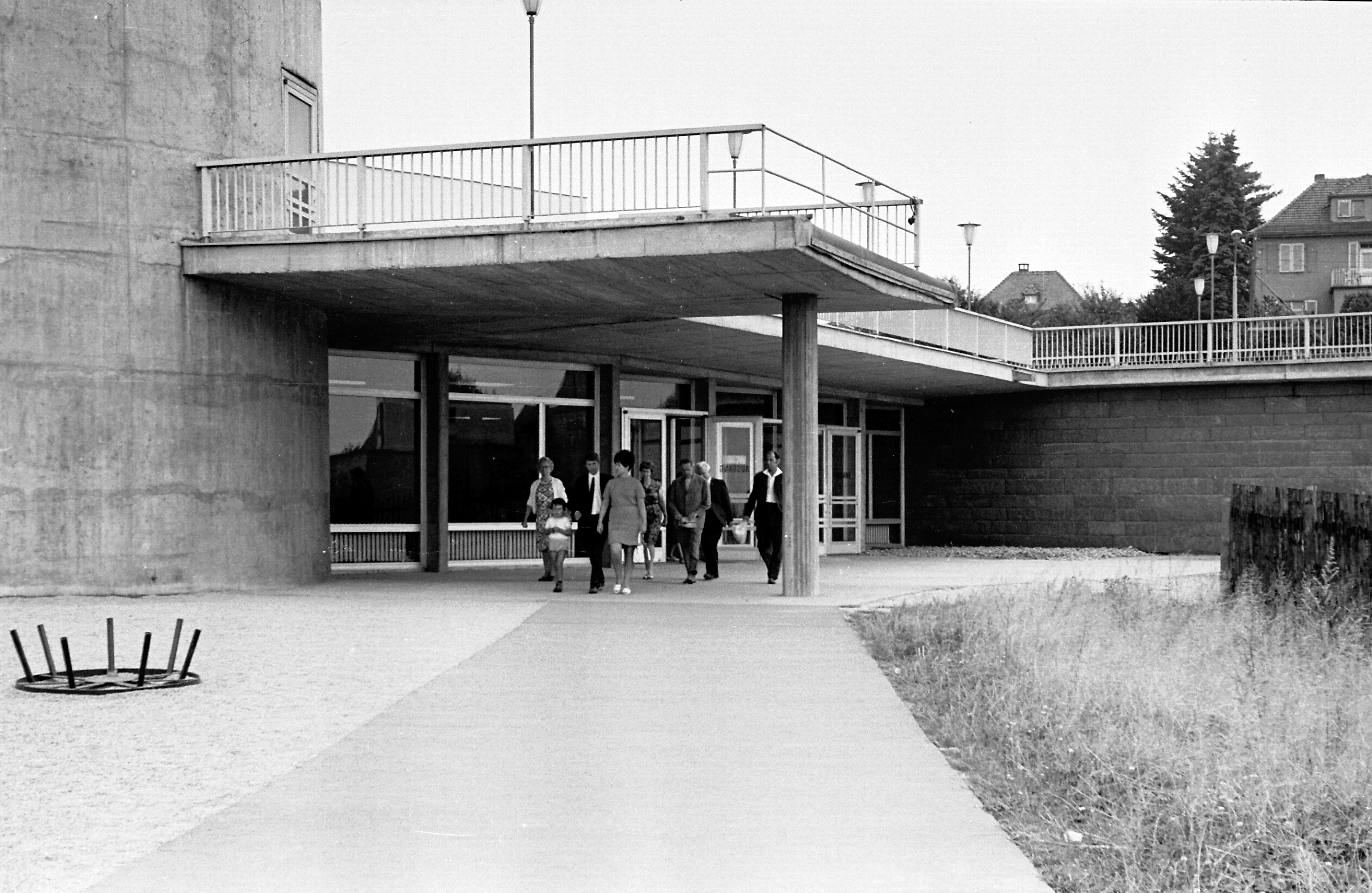 10.08.1970 Dresden-Oberwachwitz: Fernsehturm, Fußbebauung. Errichtet 1964-69 nach Plänen von Kurt Nowotny, Herrmann Rühle und Johannes Braune. Gesamthöhe 252 m. Hier in der DDR war er den Bürgern noch öffentlich als Aussichtsturm zugänglich [F19700810A012.JPG]1970081020NR.JPG(c)Blobelt